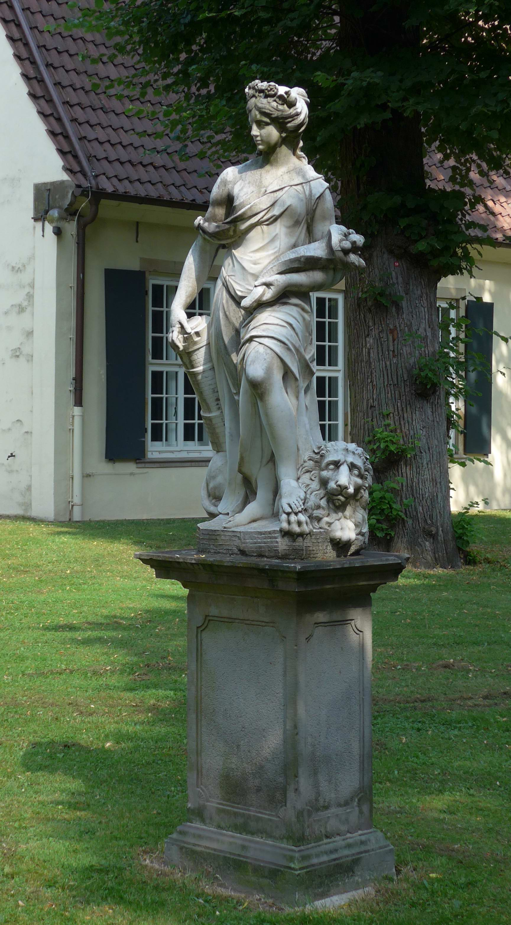 Giovanni Antonio Cybei, Terra aus einem Zyklus der vier Elemente. Marmor, um 1765, Focke-Museum Bremen.